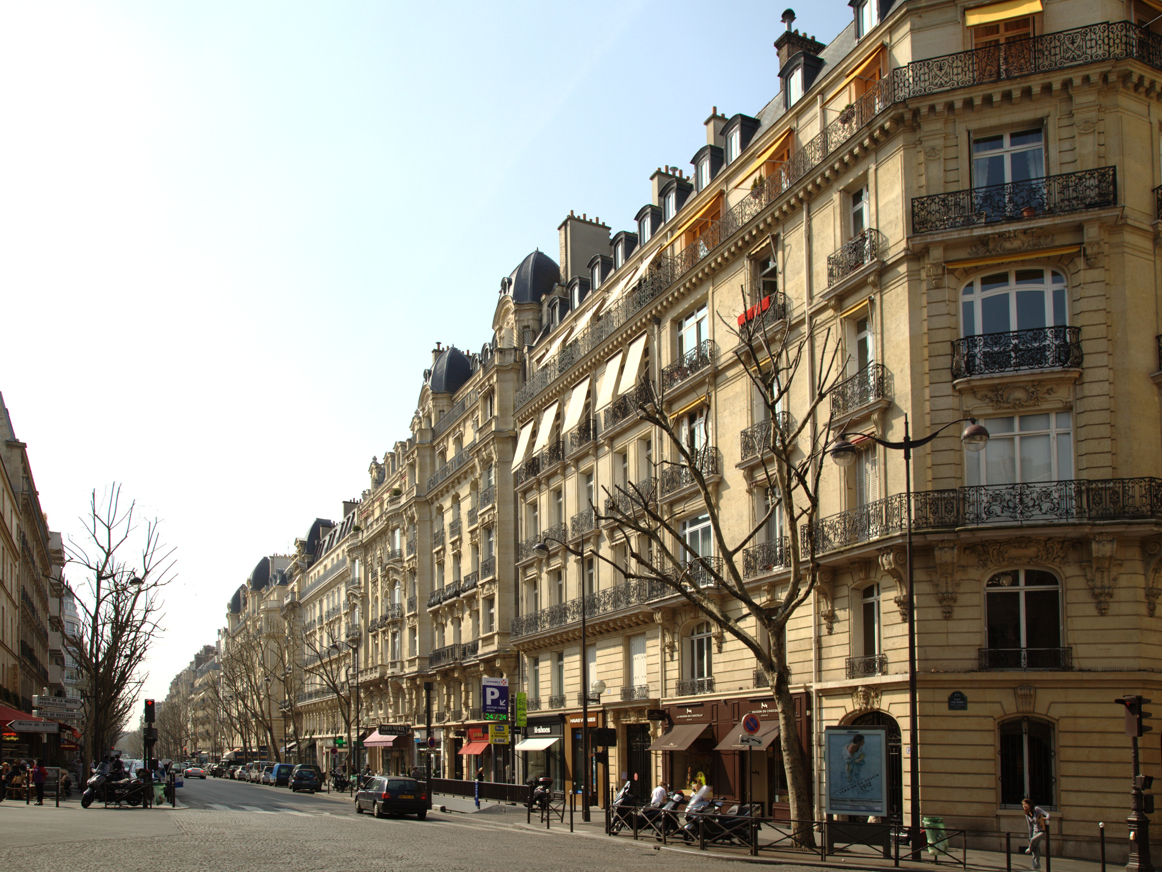 L'avenue Victor-Hugo à Paris. Vue vers le sud-est au niveau de l'intersection avec la rue de la Pompe